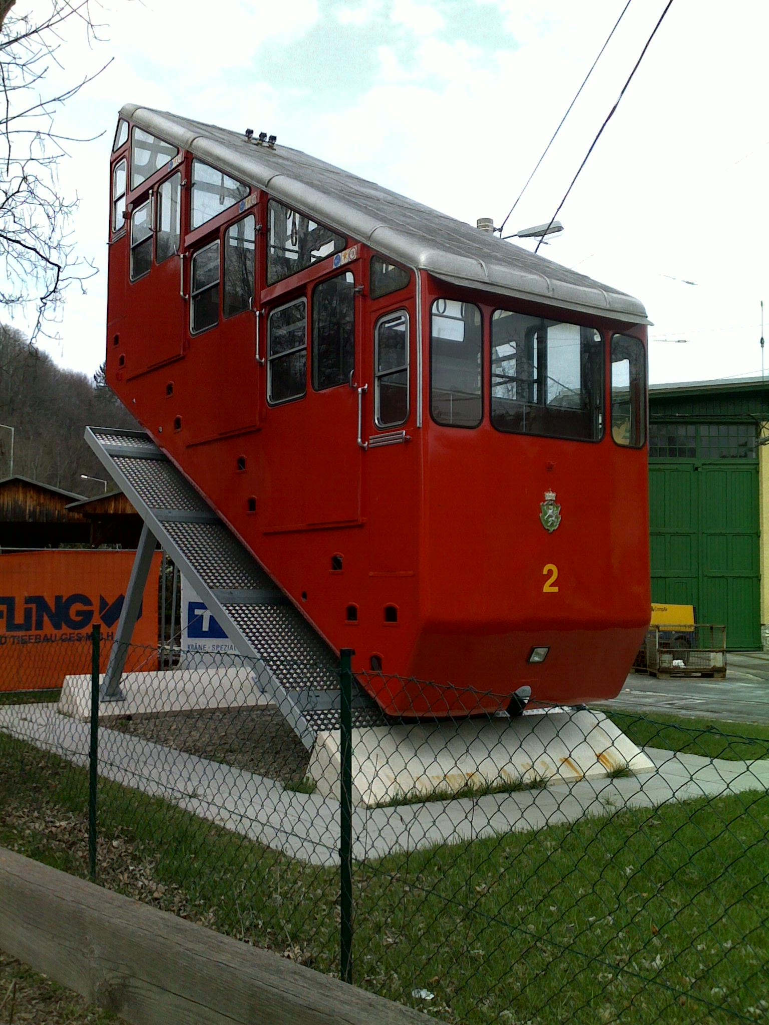 Altes Modell der Grazer Schloßbergbahn